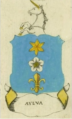 Familiewapen Van Aylva